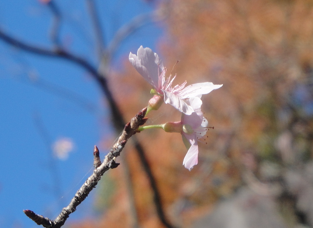 秋に開いた四季桜の花。